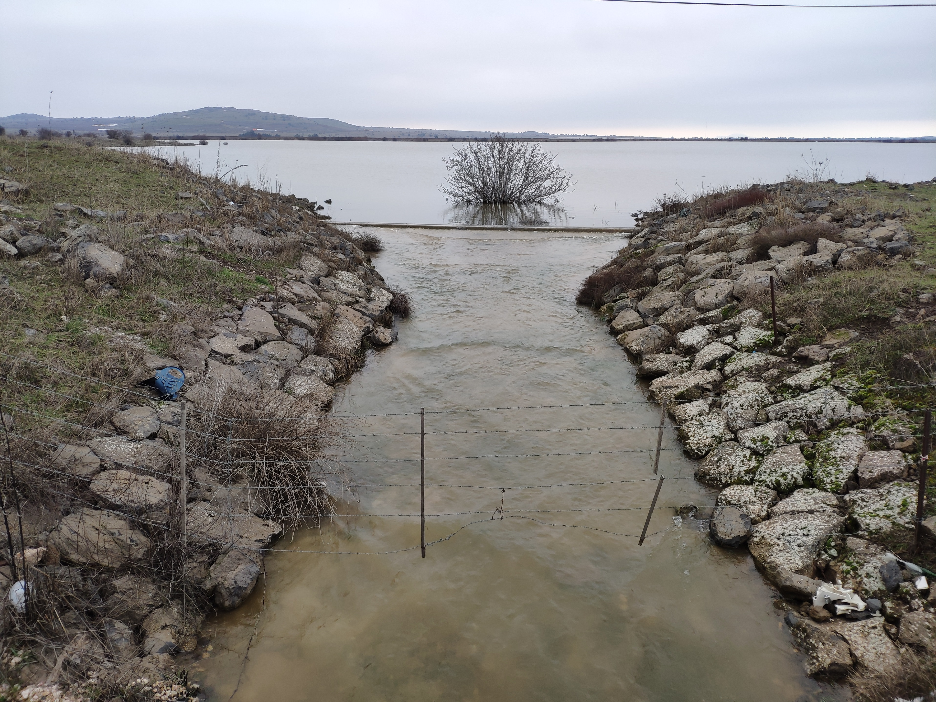 מים עודפים ממאגר בנטל זורמים מערבה. מים אלה הנמצאים ממזרח לקו פרשת המים ברמת הגולן מוסטים מערבה לאגן הכנרת.